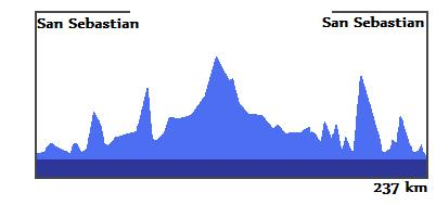 Løypeprofil for San Sebastian